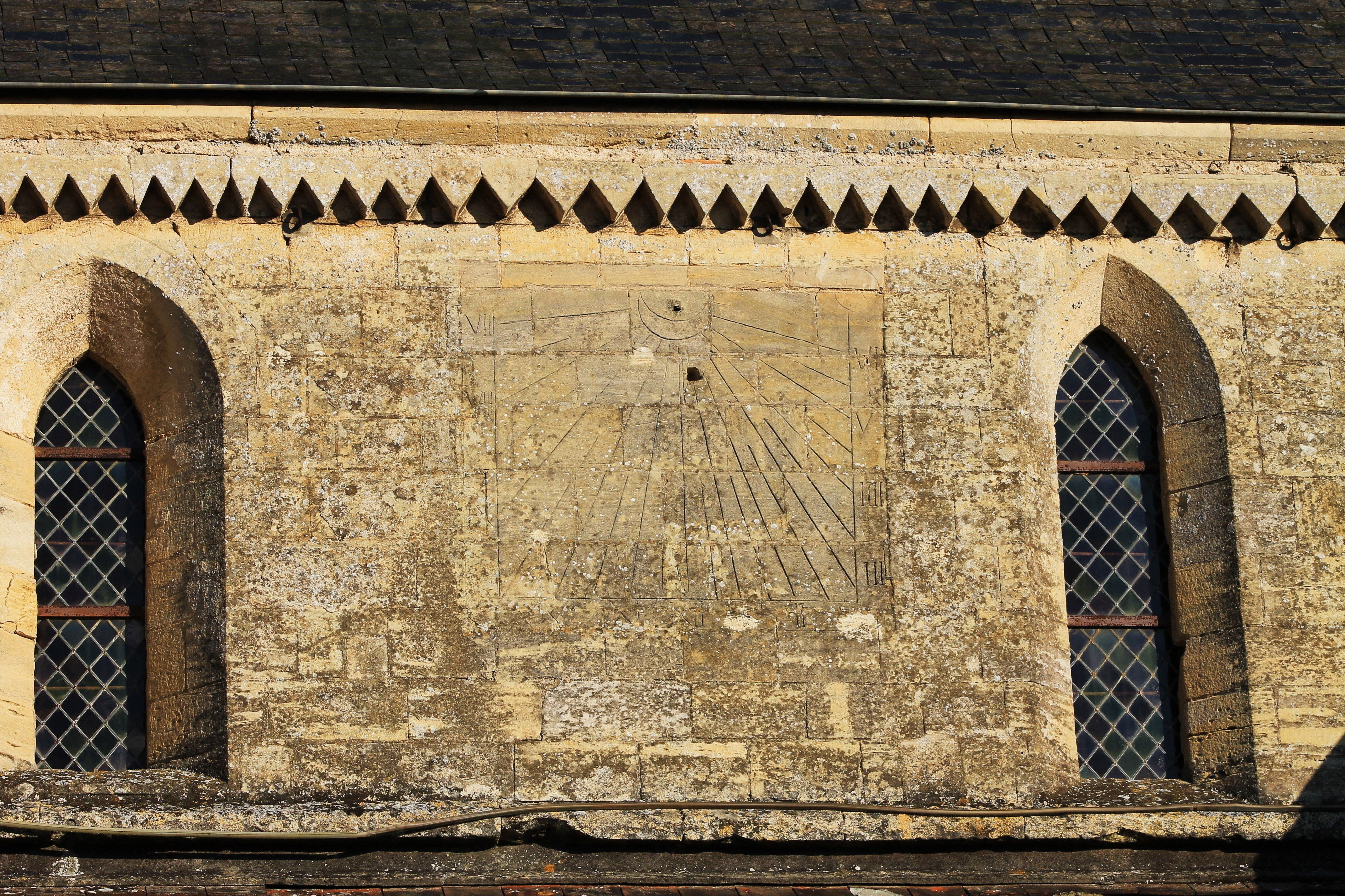 Cadran solaire sur la façade de l'église Saint-Martin de Langrune-sur-Mer (Calvados)